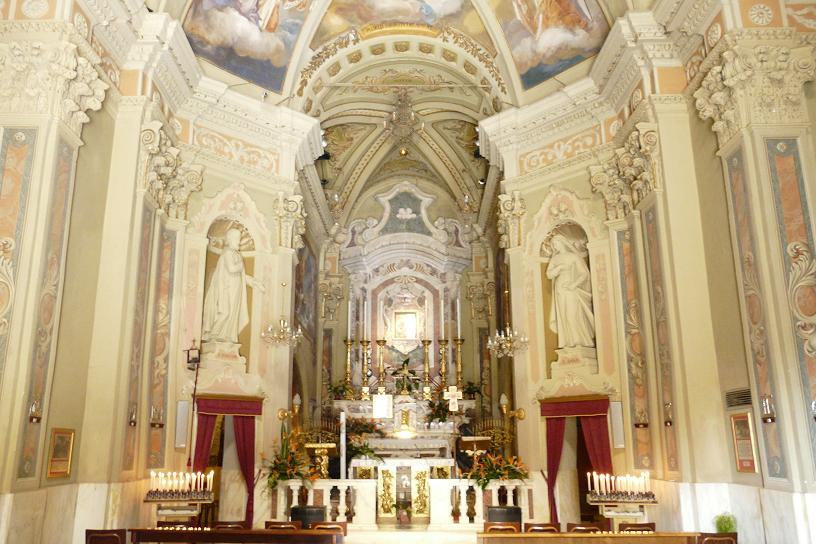 Foto varie del Santuario di Nostra Signora di Lampedusa, Castellaro, Liguria, Italia